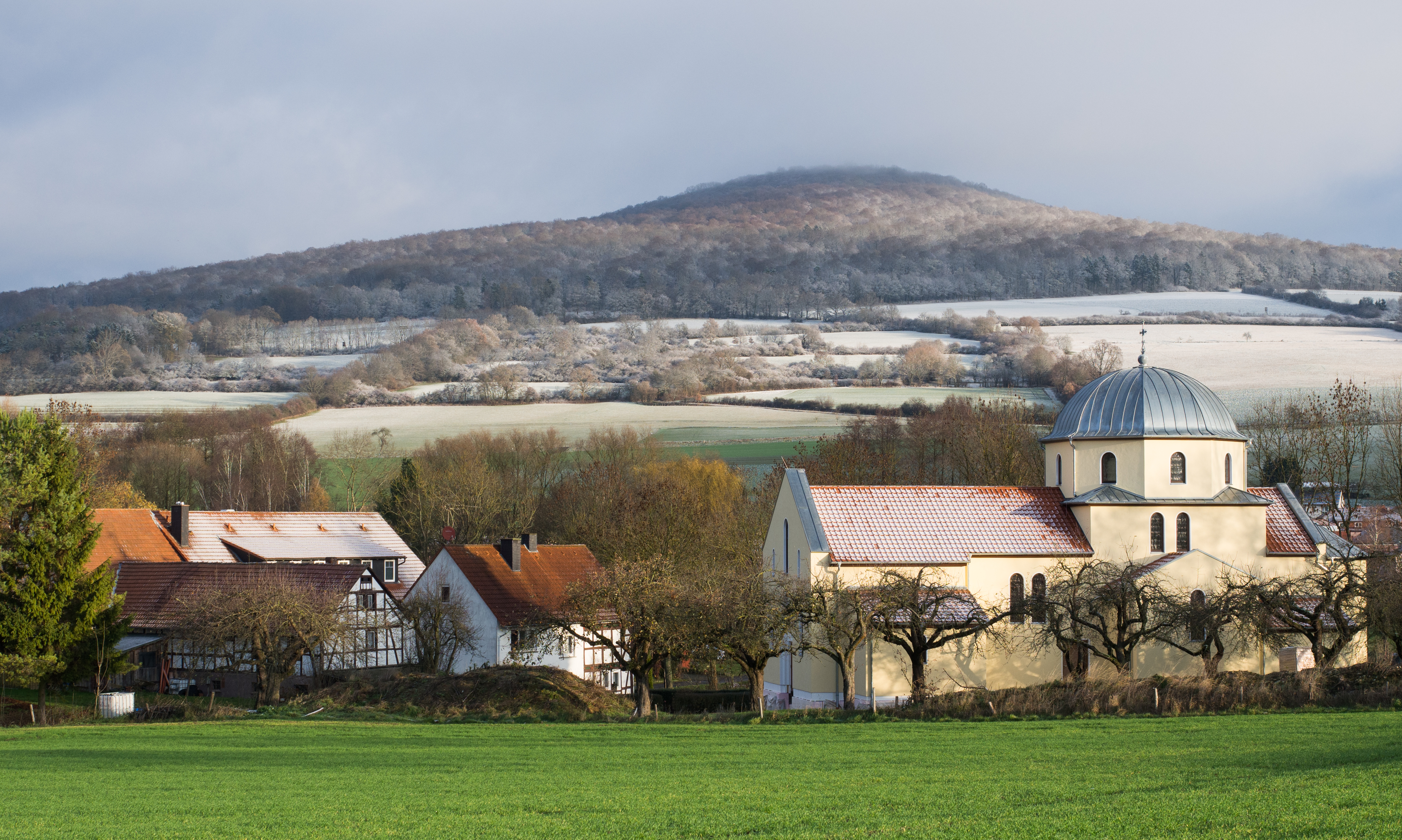 Die im Jahr 2015 neu erbaute Kirche des serbisch orthodoxen Klosters in Unterufhausen mit dem Kloster links davon. Im Hintergrund der Soisberg